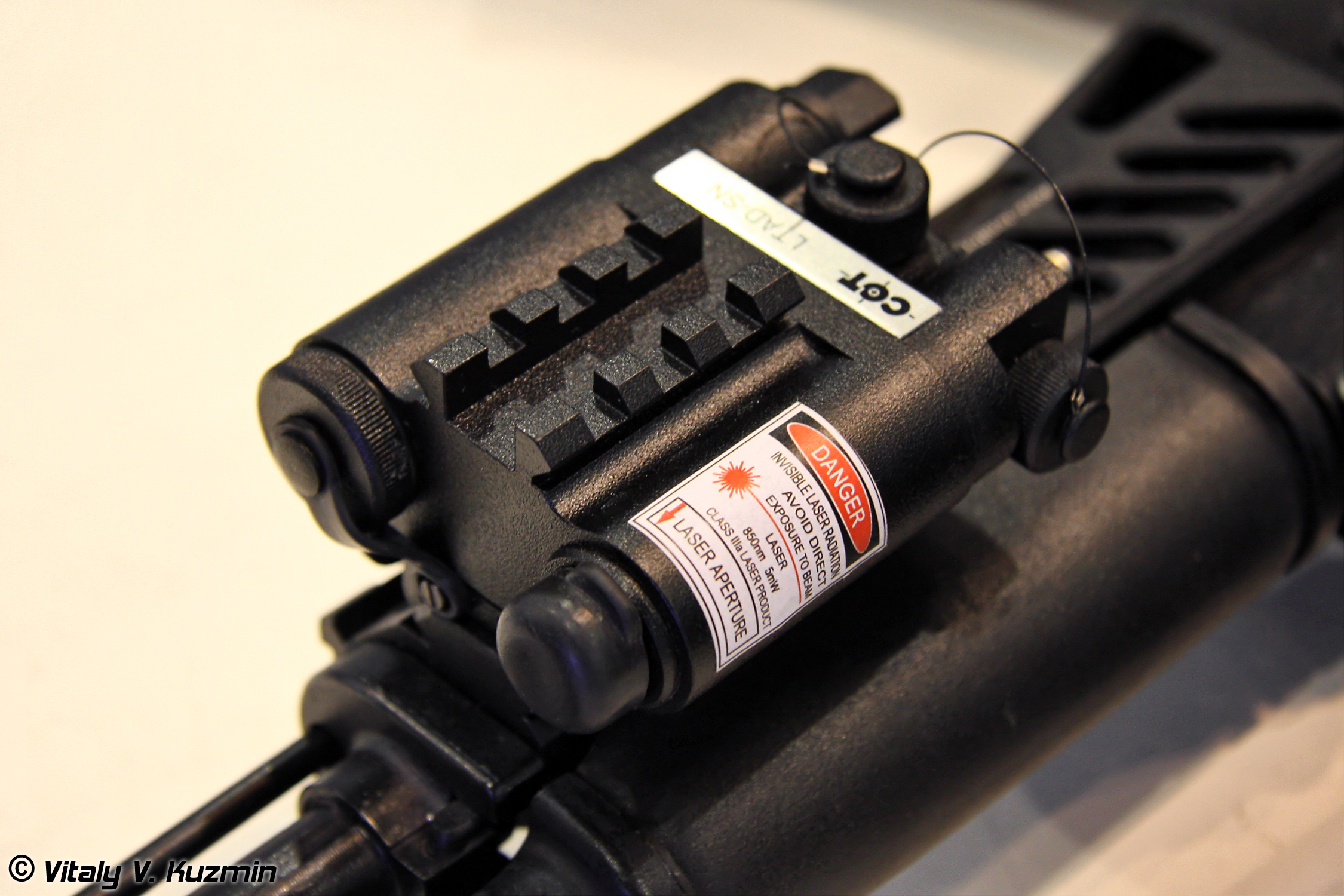 Лазерный целеуказатель LTAD-SN (LTAD-SN laser sight)